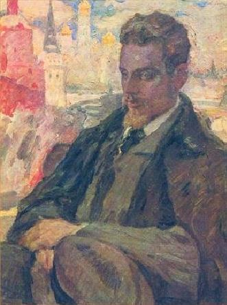 Л.Пастернак Р.Рильке в Москве 1928 г.